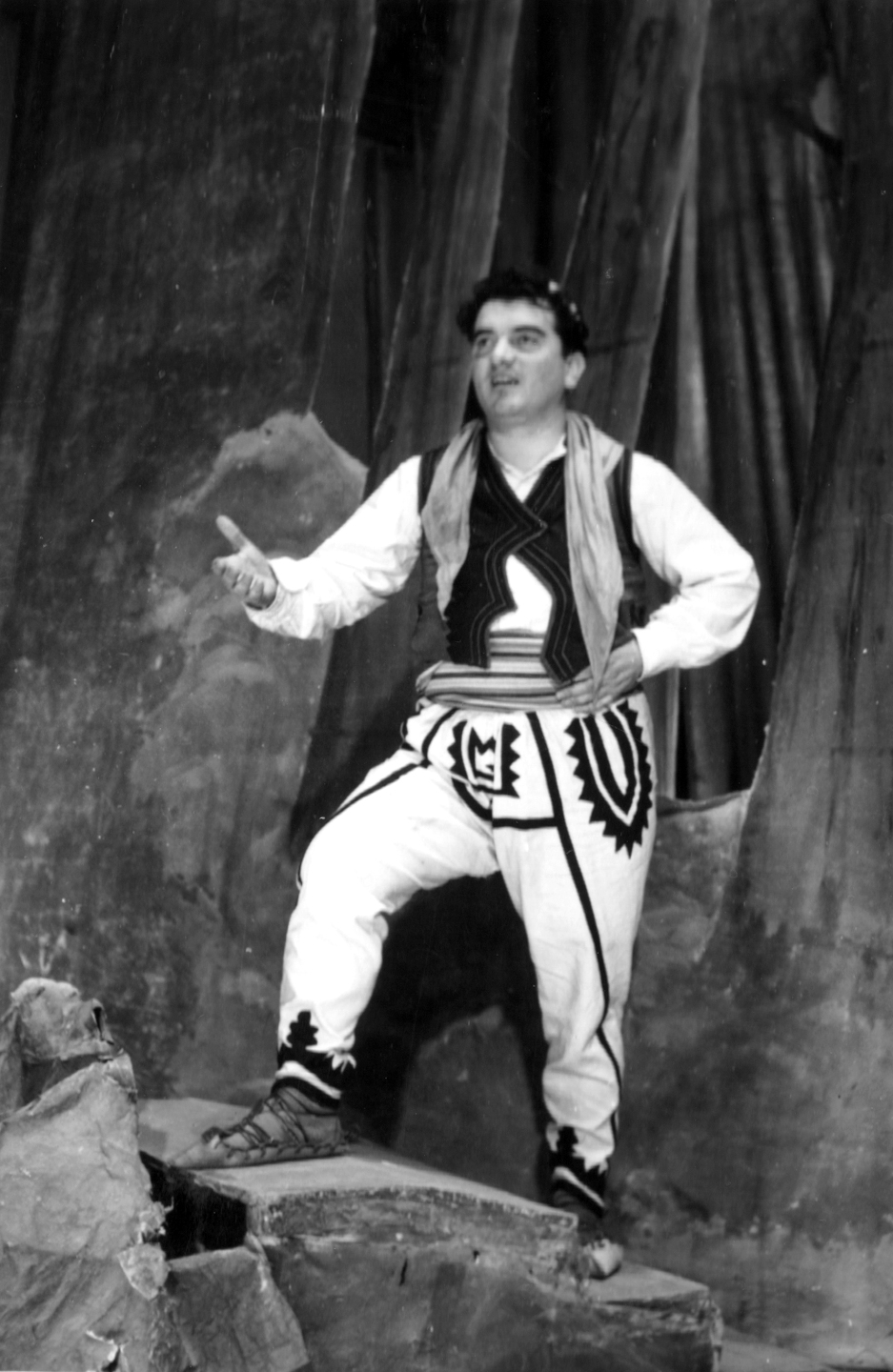 Piro_Sulioti.jpg